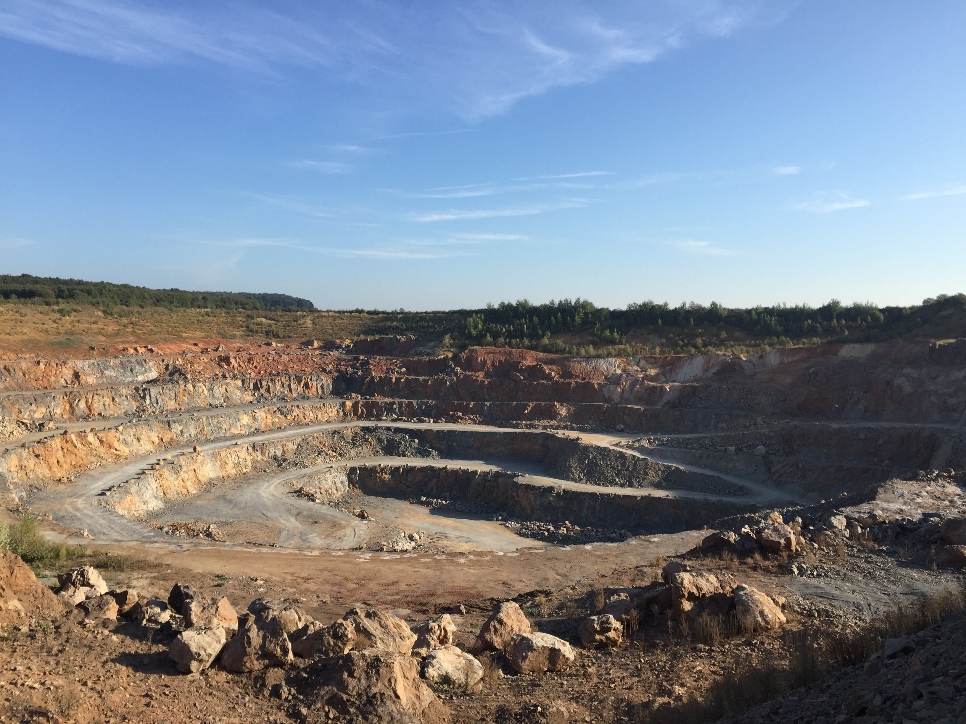 Der Steinbruch Schneelsberg Nordost der Schaefer GmbH und Co. KG liegt an der Straße zwischen Hofen und Niedertiefenbach. Er soll noch vsl. bis 2025 / 2026 betrieben werden.